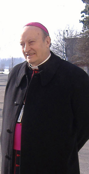 GIUSEPPE MERISI, Vescovo di Lodi.